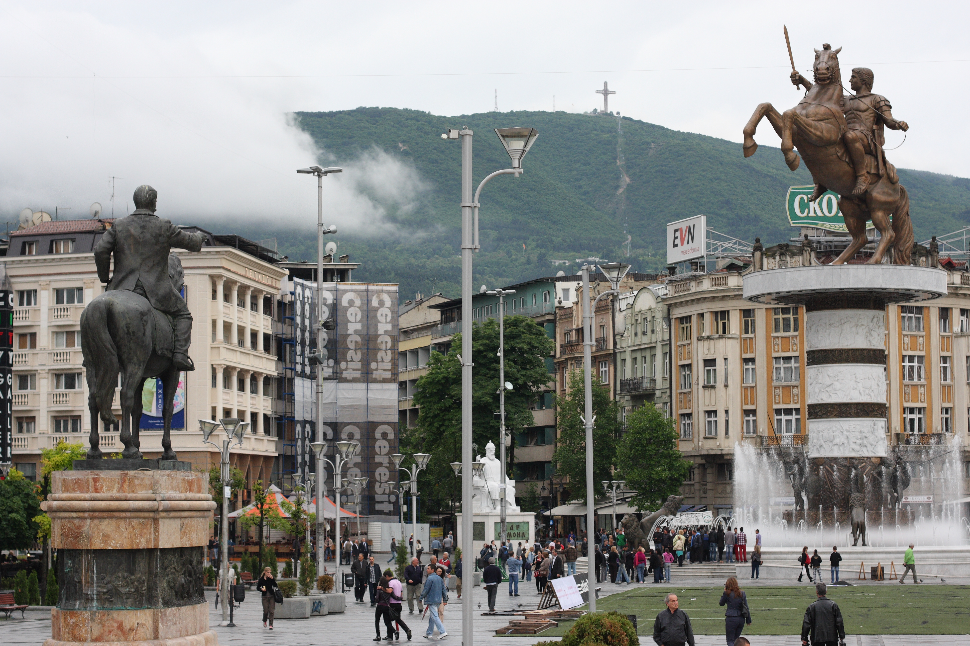 Skopje main square